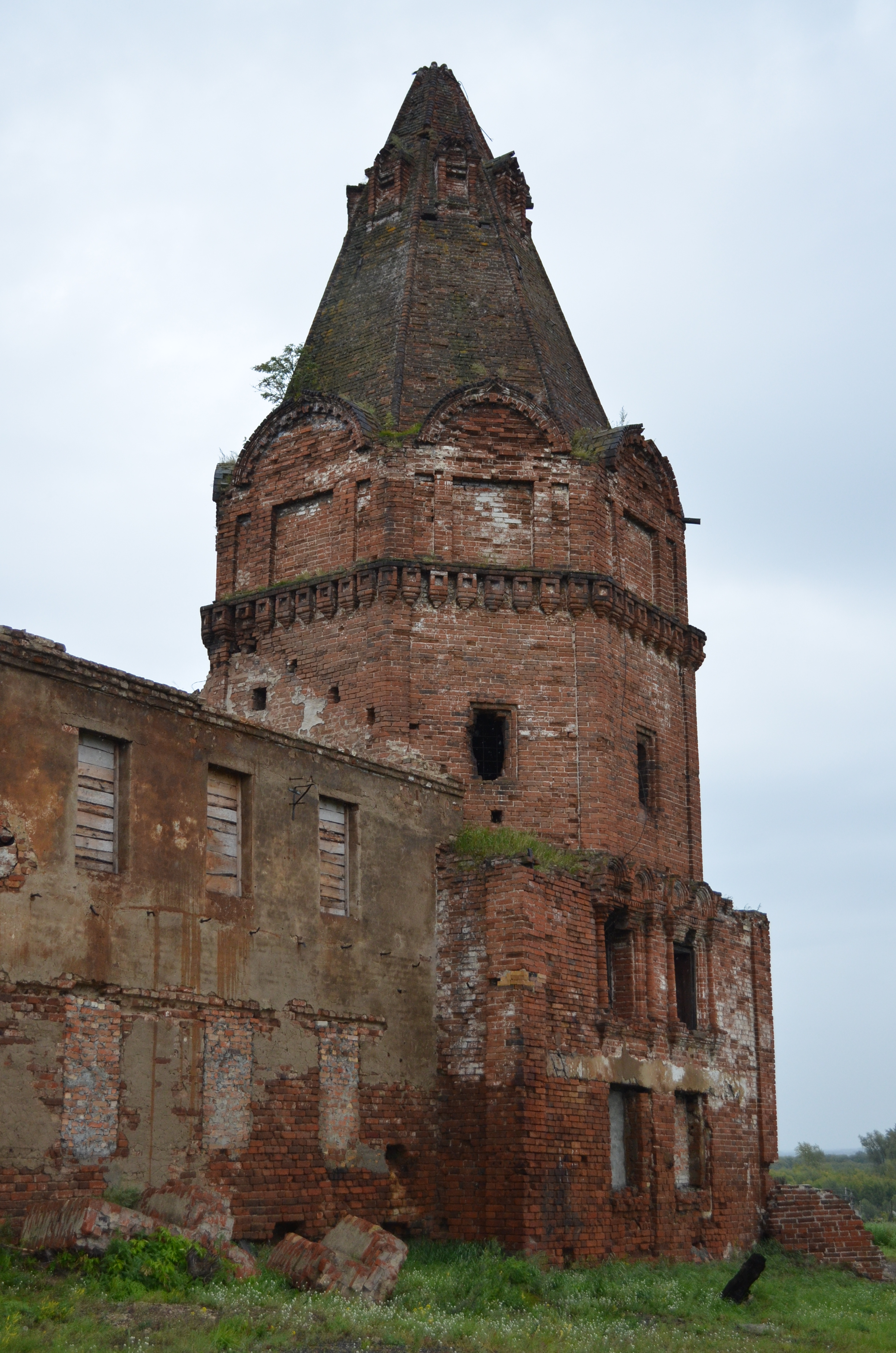 Башня юго-западная (Курганская область, Далматово, улица Советская, 63)